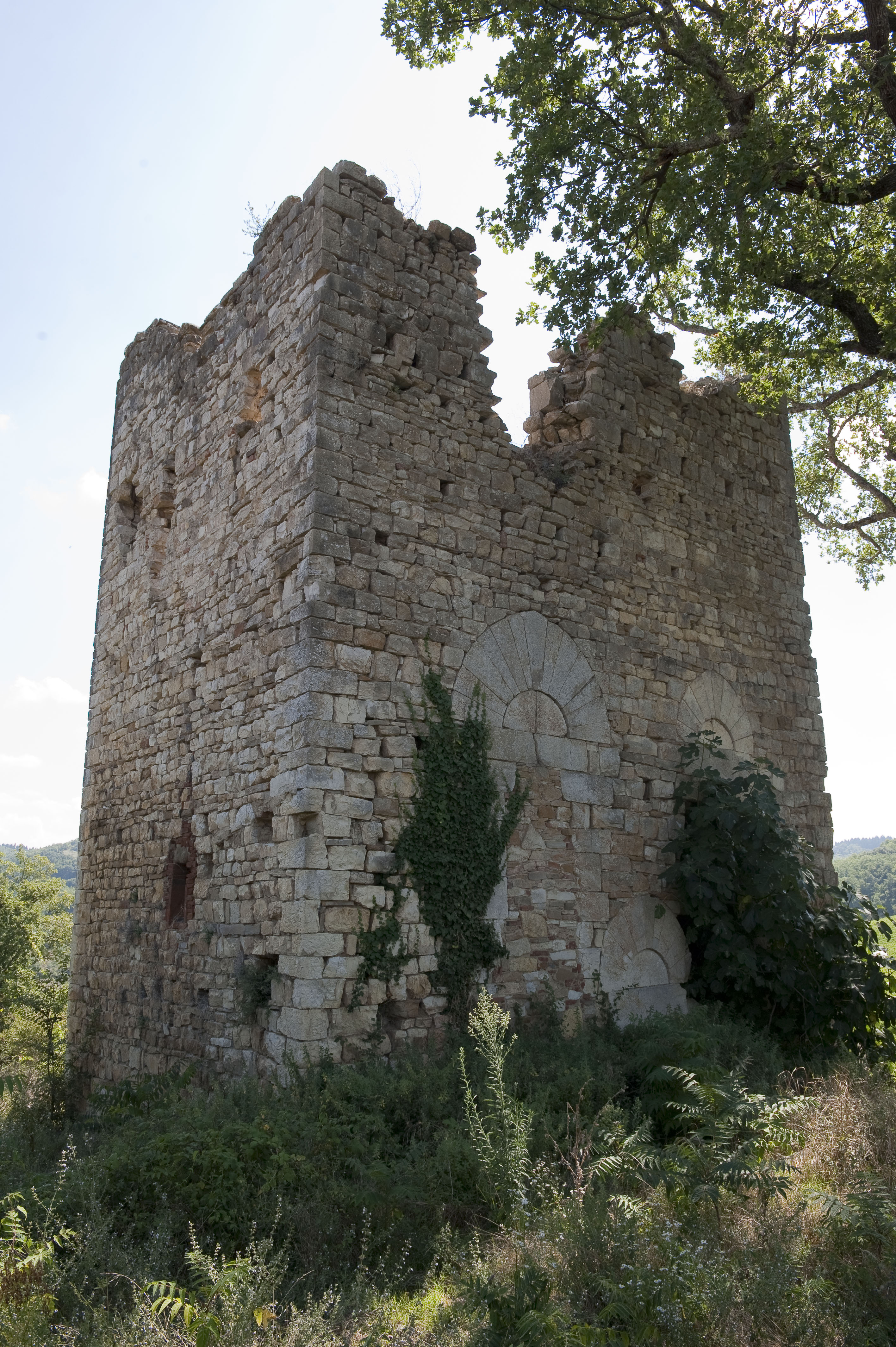 Torre situata a San polo (Tavarnelle Val di Pesa)